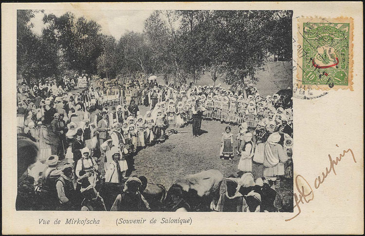 Селяни от село Мирковци в началото на 20 век.